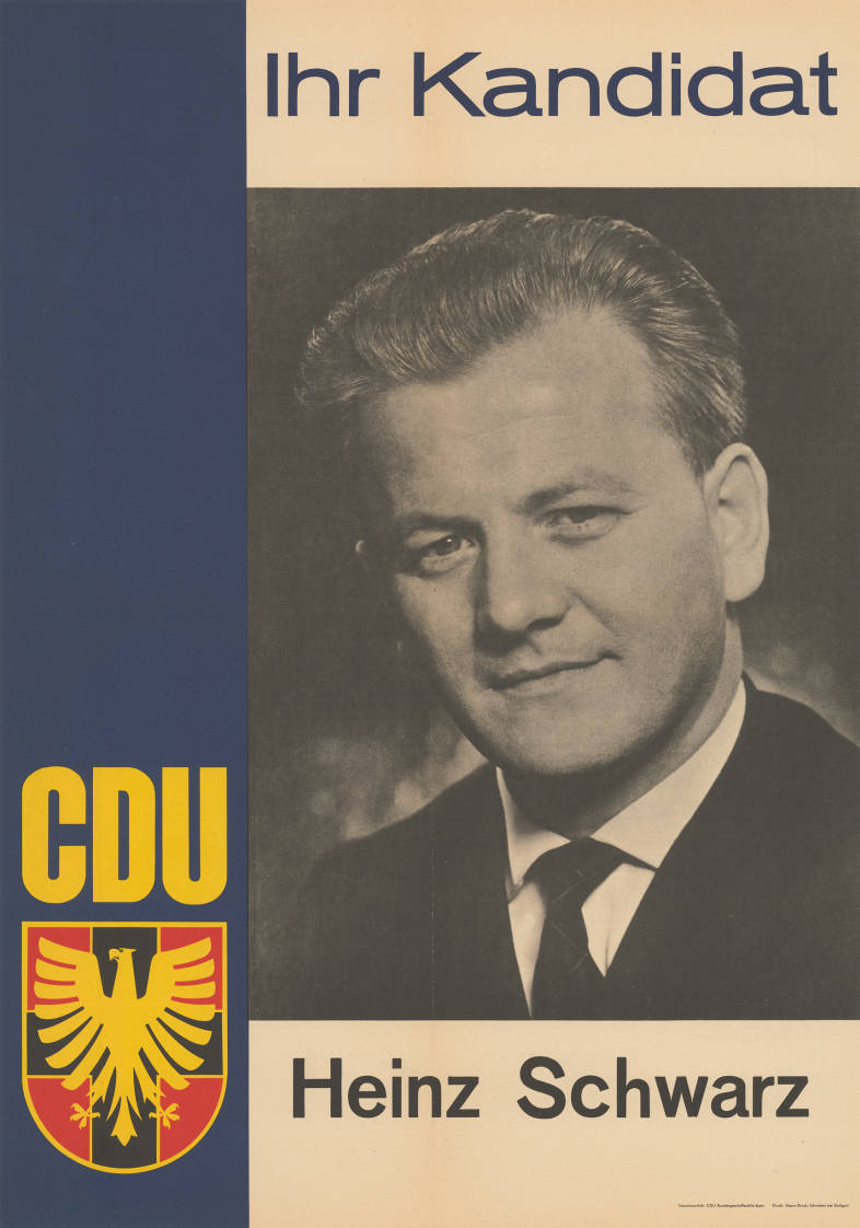 Ihr Kandidat CDU Heinz Schwarz Abbildung: Porträtfoto Plakatart: Kandidaten-/Personenplakat mit Porträt Auftraggeber: Verantw.: CDU-Bundesgeschäftsstelle Bonn Drucker_Druckart_Druckort: Repro-Druck, Schmiden bei Stuttgart Objekt-Signatur: 10-010 : 200 Bestand: Landtagswahlplakate Rheinland-Pfalz (10-010) GliederungBestand10-18: Landtagswahlplakate Rheinland-Pfalz (10-010) » CDU Lizenz: KAS/ACDP 10-010 : 200 CC-BY-SA 3.0 DE